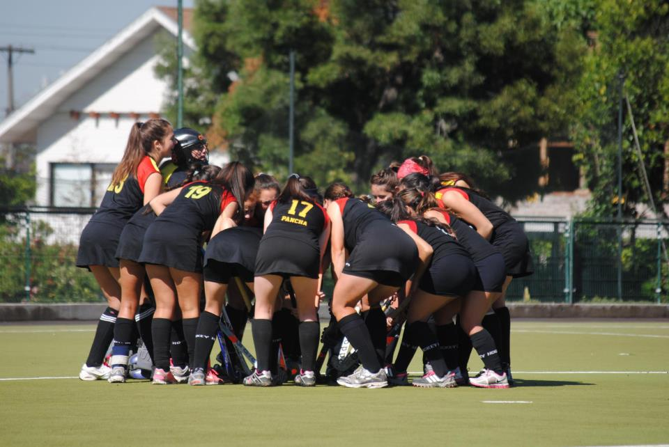 Equipo CDA